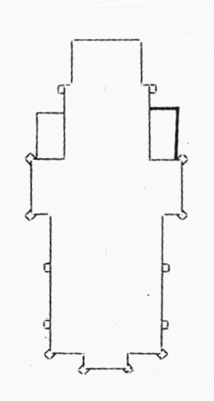 Plan cadastral de l'église catholique romaine Sainte-Pétronille à Pregny-Chambésy (GE), en Suisse.